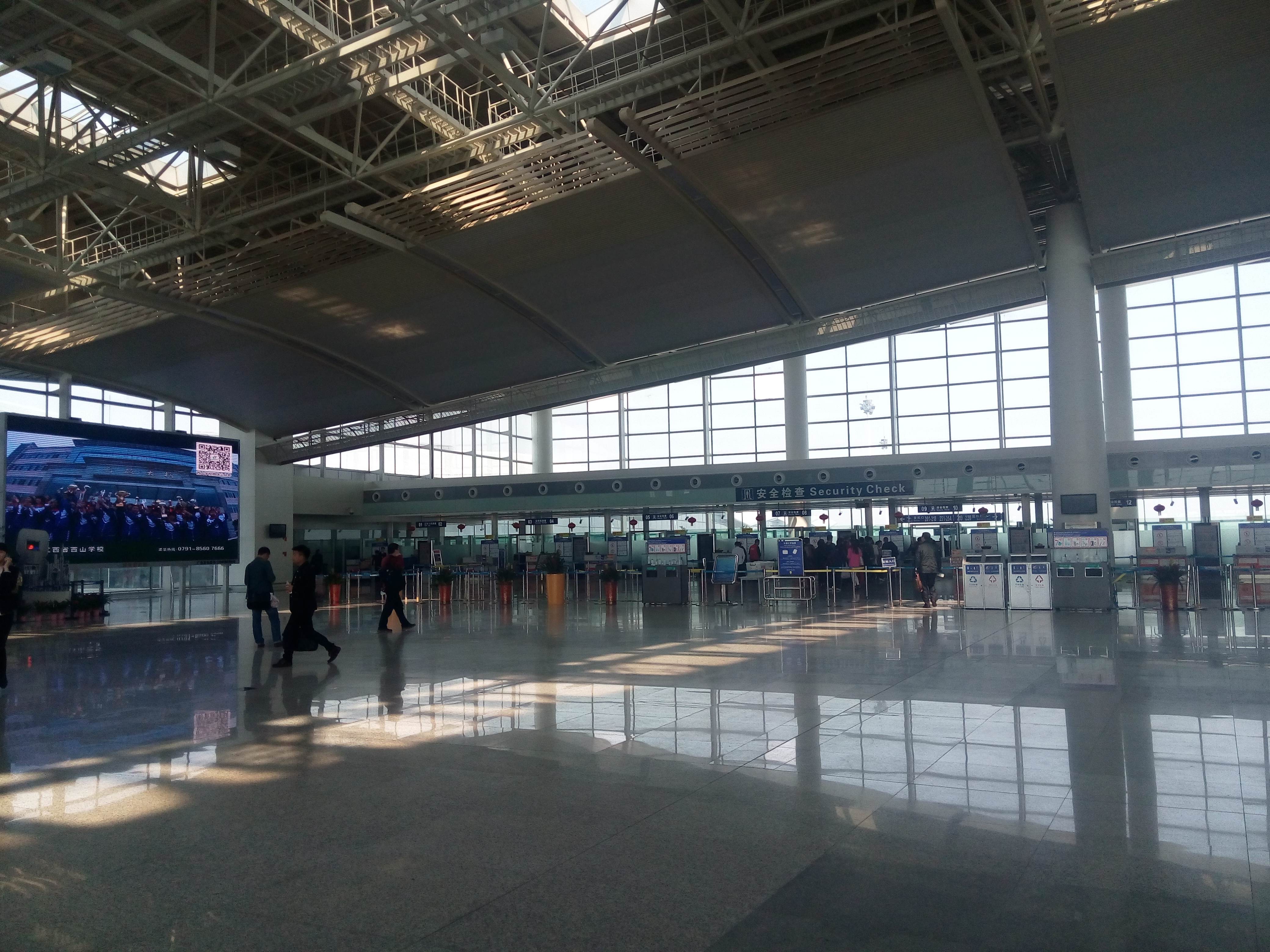 昌北机场。T2航站楼西侧楼安检口